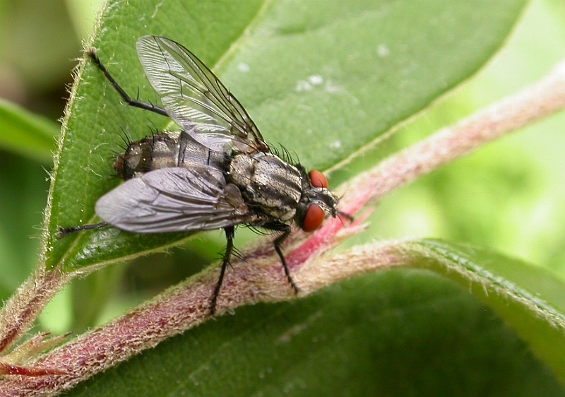 Sarcophaga carnaria, Gradignan, Gironde, France